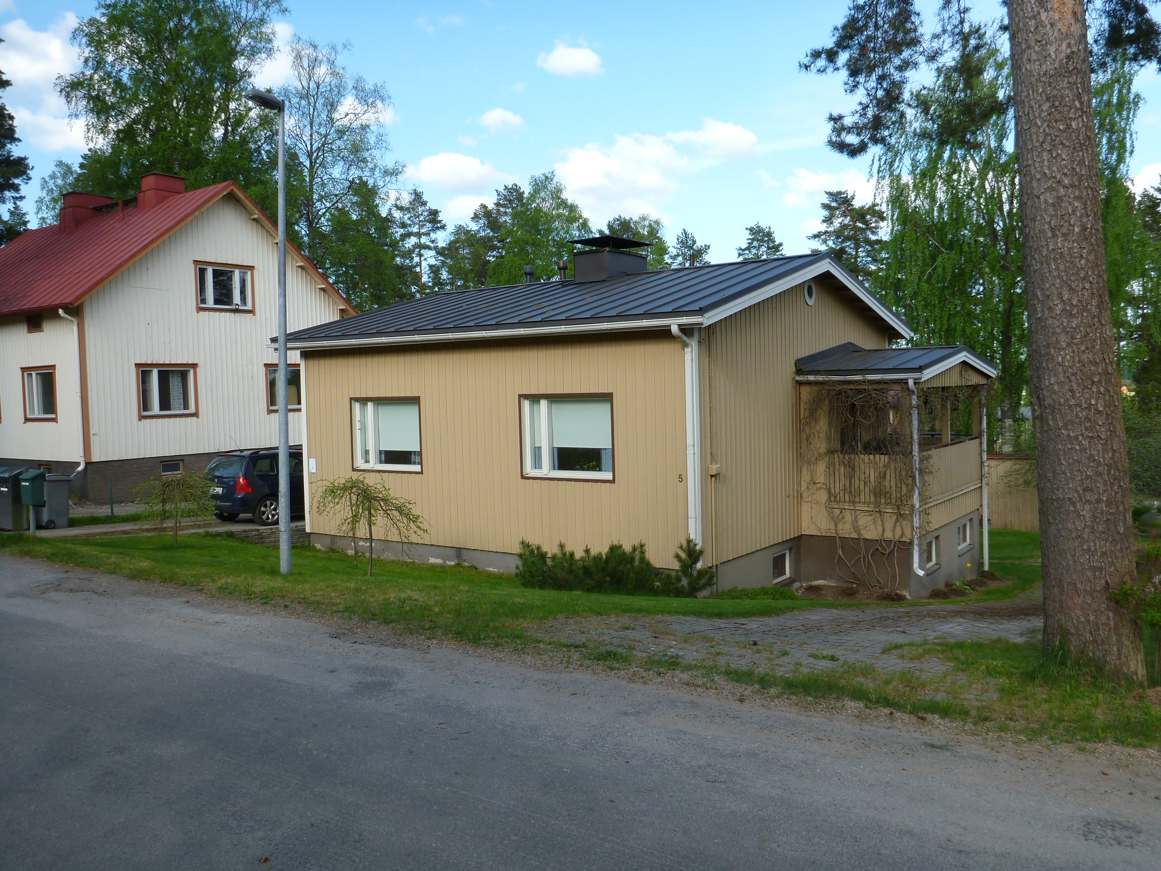 Mäntykatua Jyväskylän Kypärämäessä